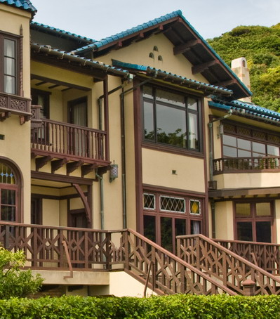 The Literature Museum in Kamakura